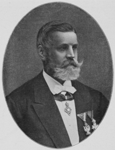 Emilián František Skramlík (1834 - 1903), Český výrobce nábytku a pražský komunální politik.